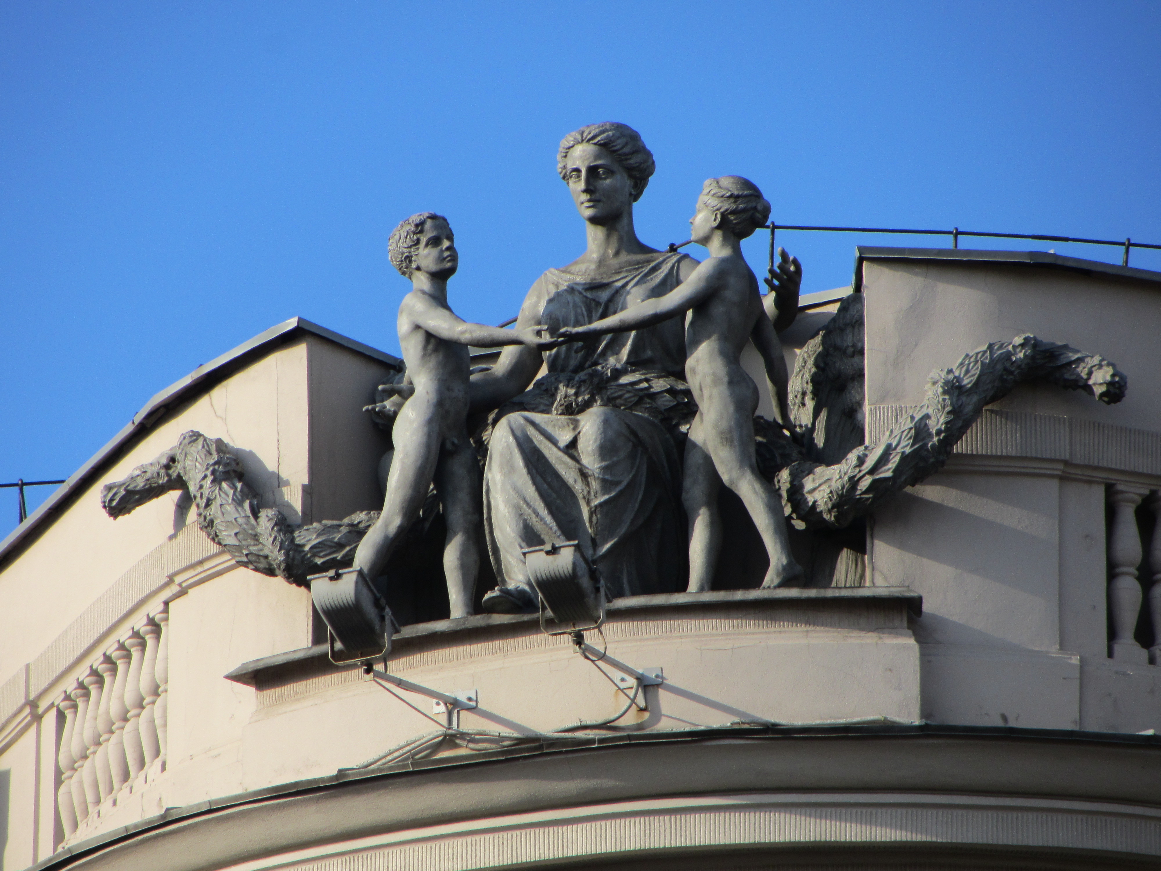 Беларуская (тарашкевіца): Скульптурная кампазыцыя «Дэмэтра зь дзецьмі» на колішнім доме Менскага земляробчага таварыства ў Менску.